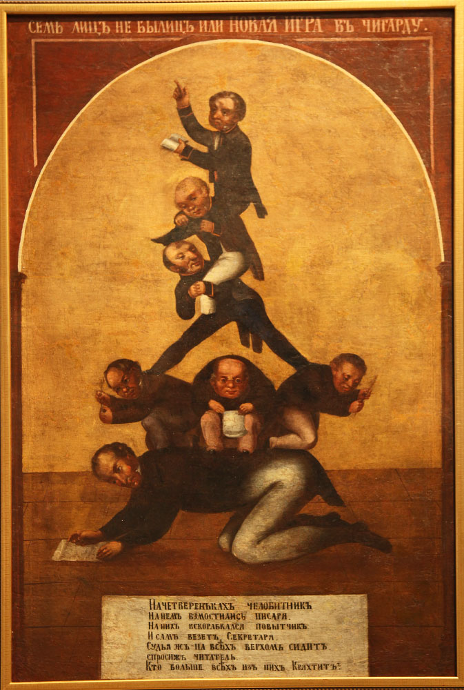 Неизвестный художник (П. М. Боклевский ?) Карикатура на судебную систему. Конец 1850-х (?) гг. Коллекция С. Григорьянца